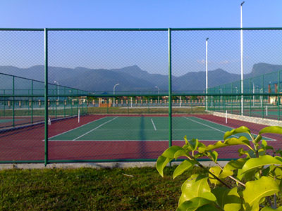 Maktab Rendah Sains Mara Merbok, Gelanggang Tenis